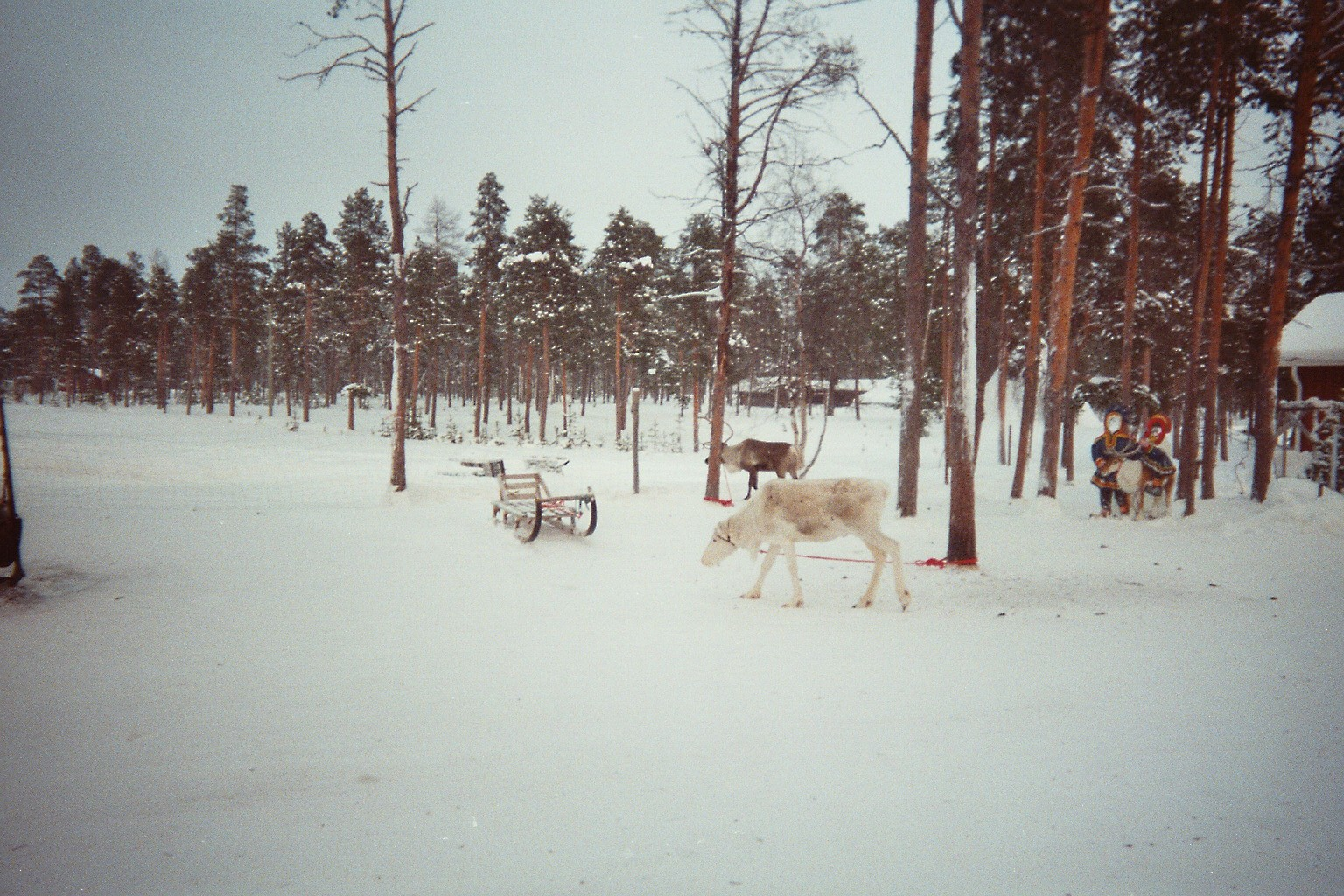 rennes en Laponie finlandaise, près du lac Inari